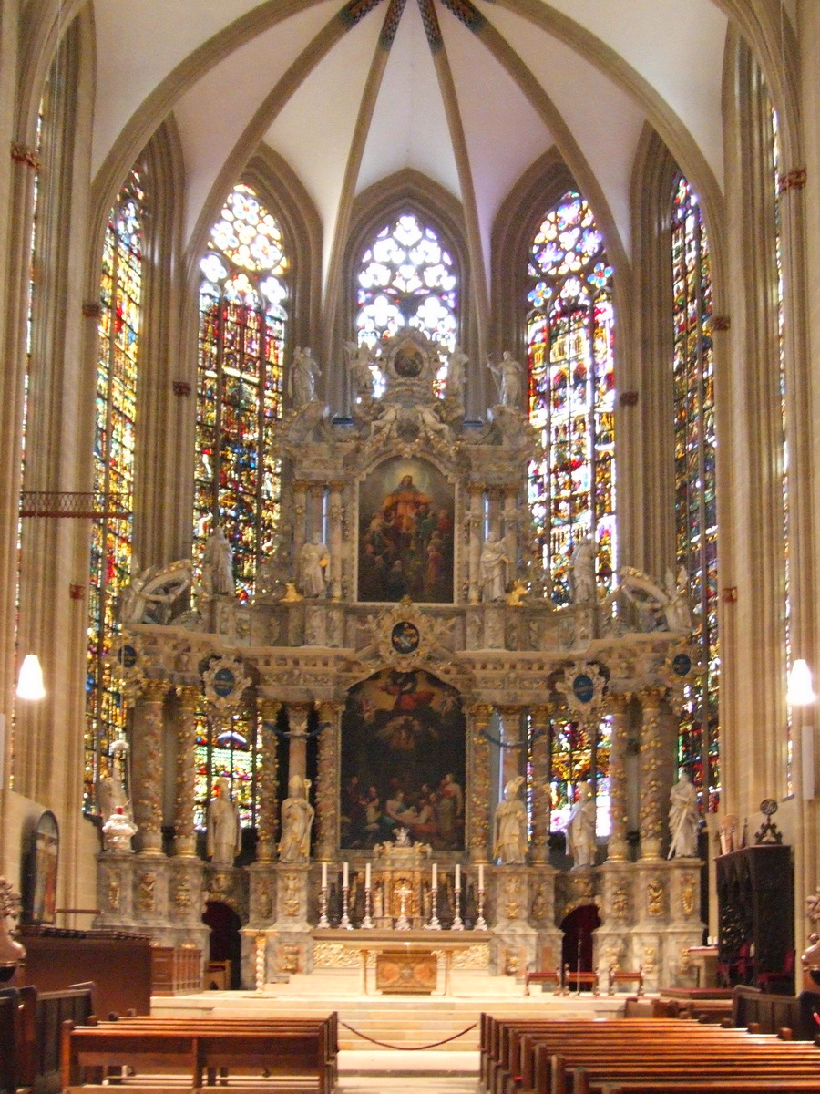 Erfurter Dom, Erfurt, Thuringia, Germany